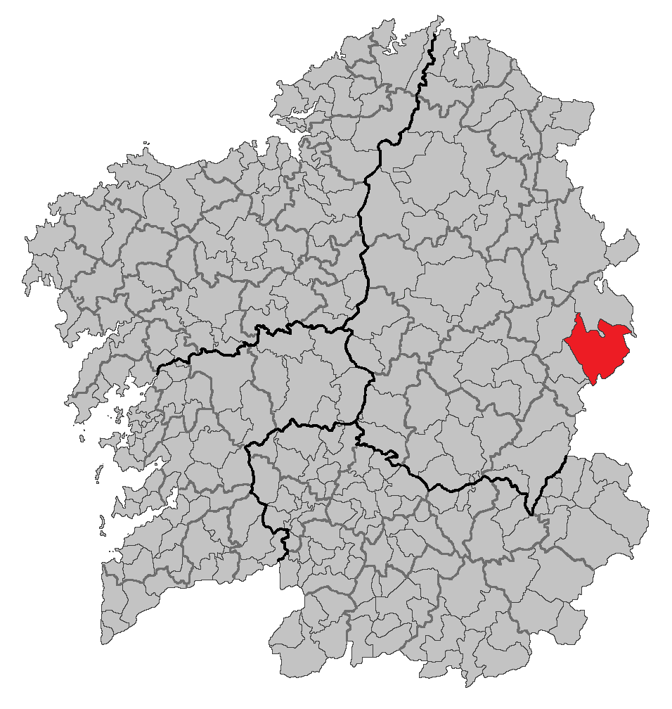 Mapa coa localización do concello de Cervantes.